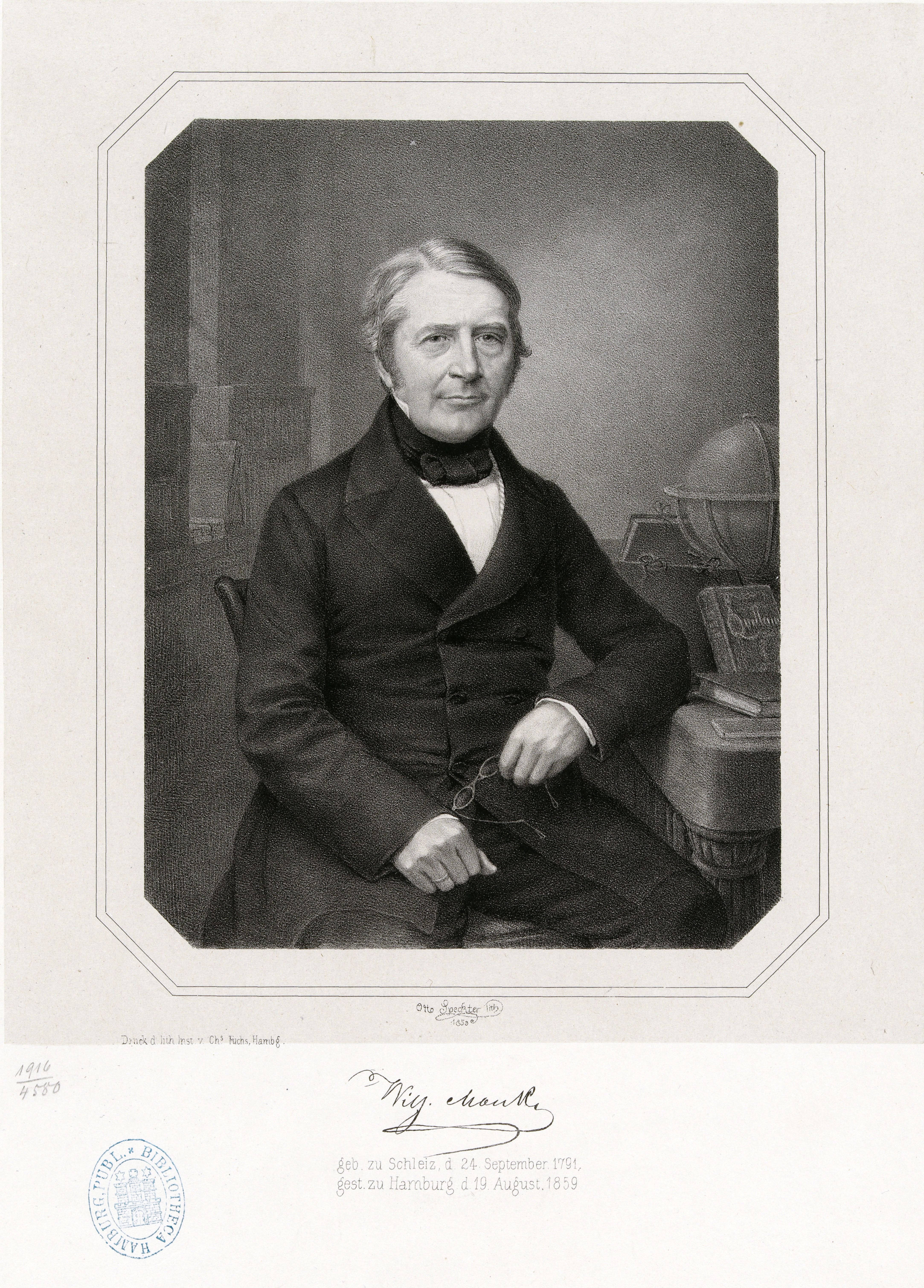 Bildnis von Johann Heinrich Wilhelm Mauke